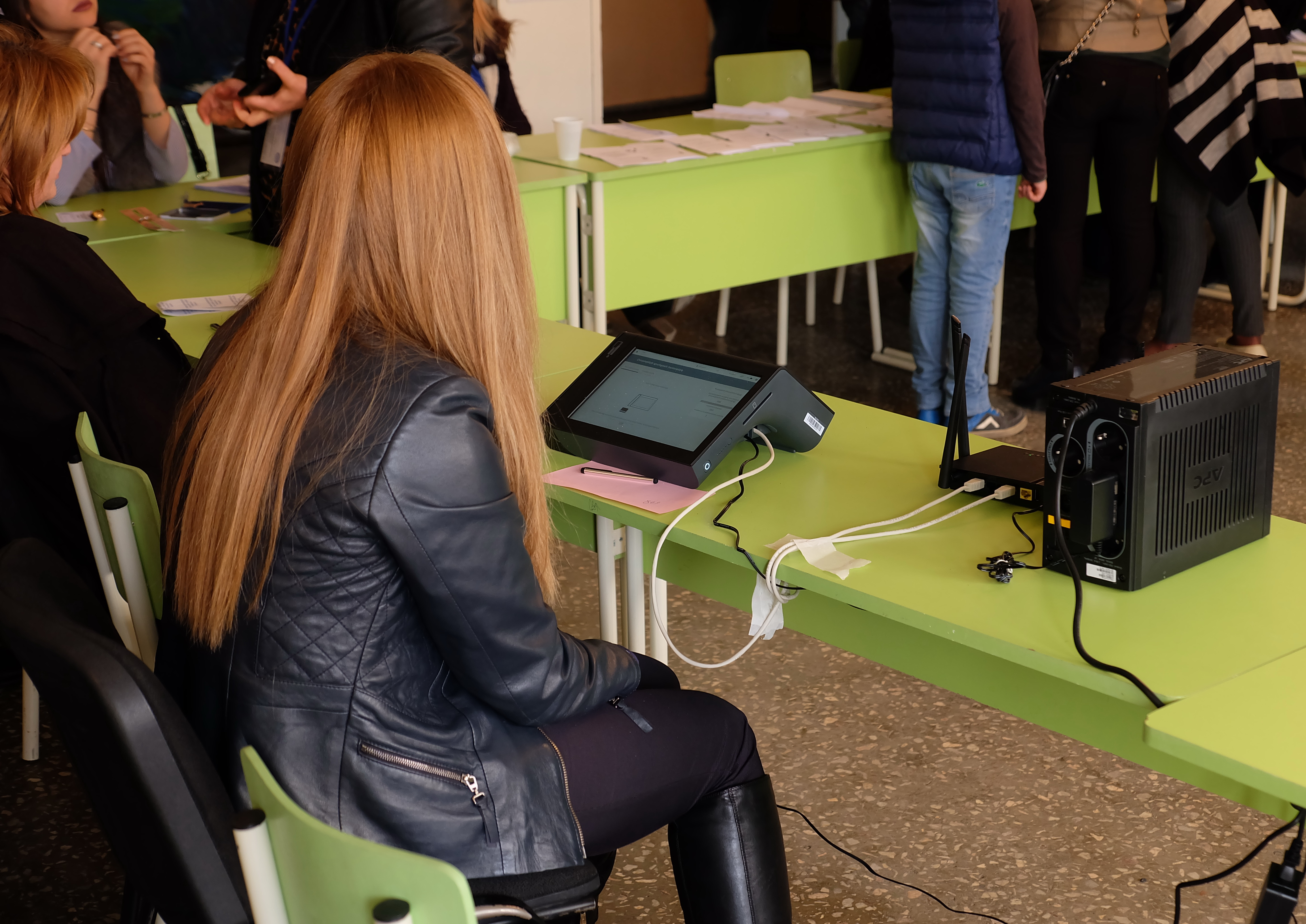 Комплекс сканирования отпечатков пальцев и паспортов.